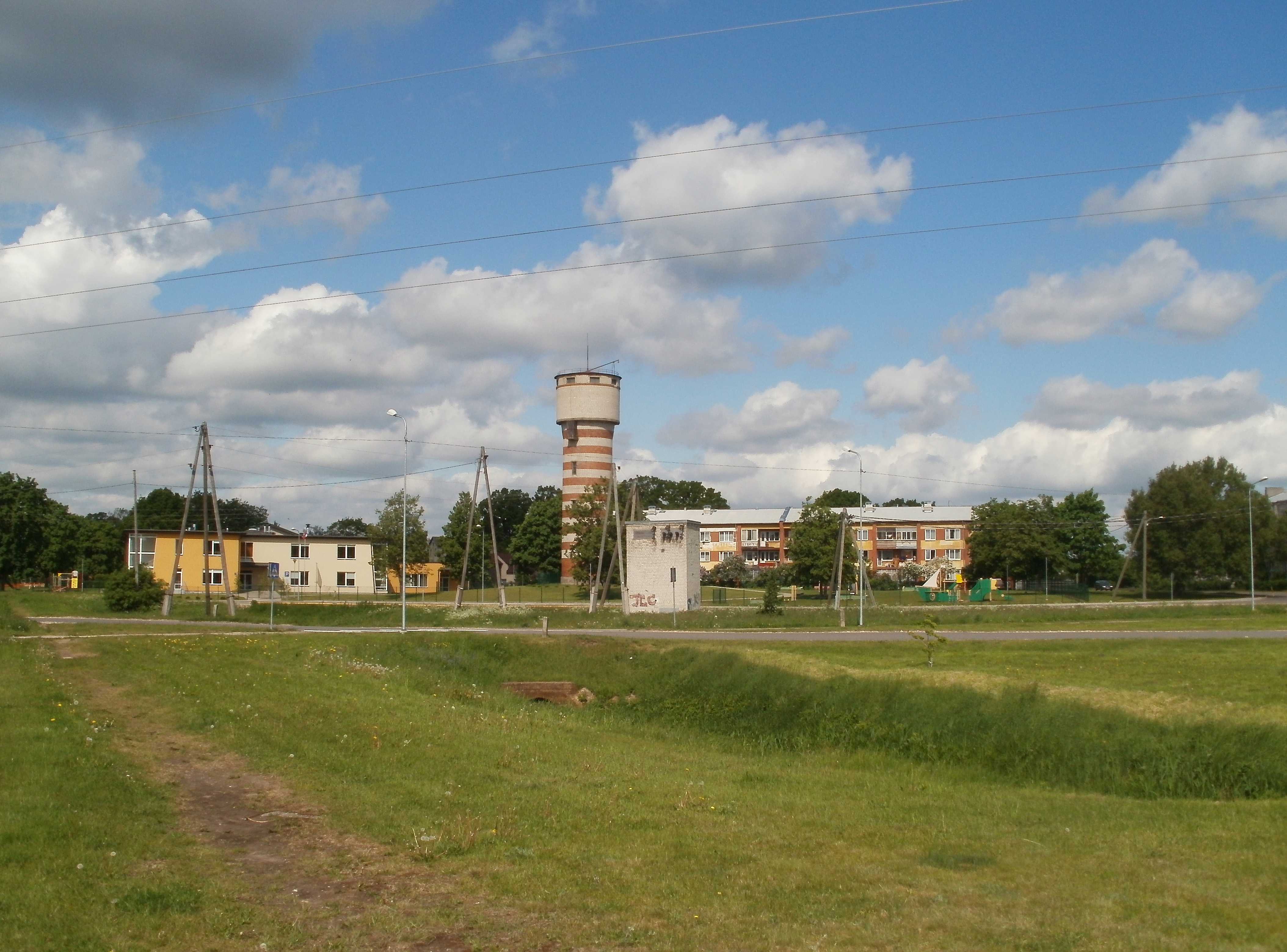 Kategorija:Olaines pagasts